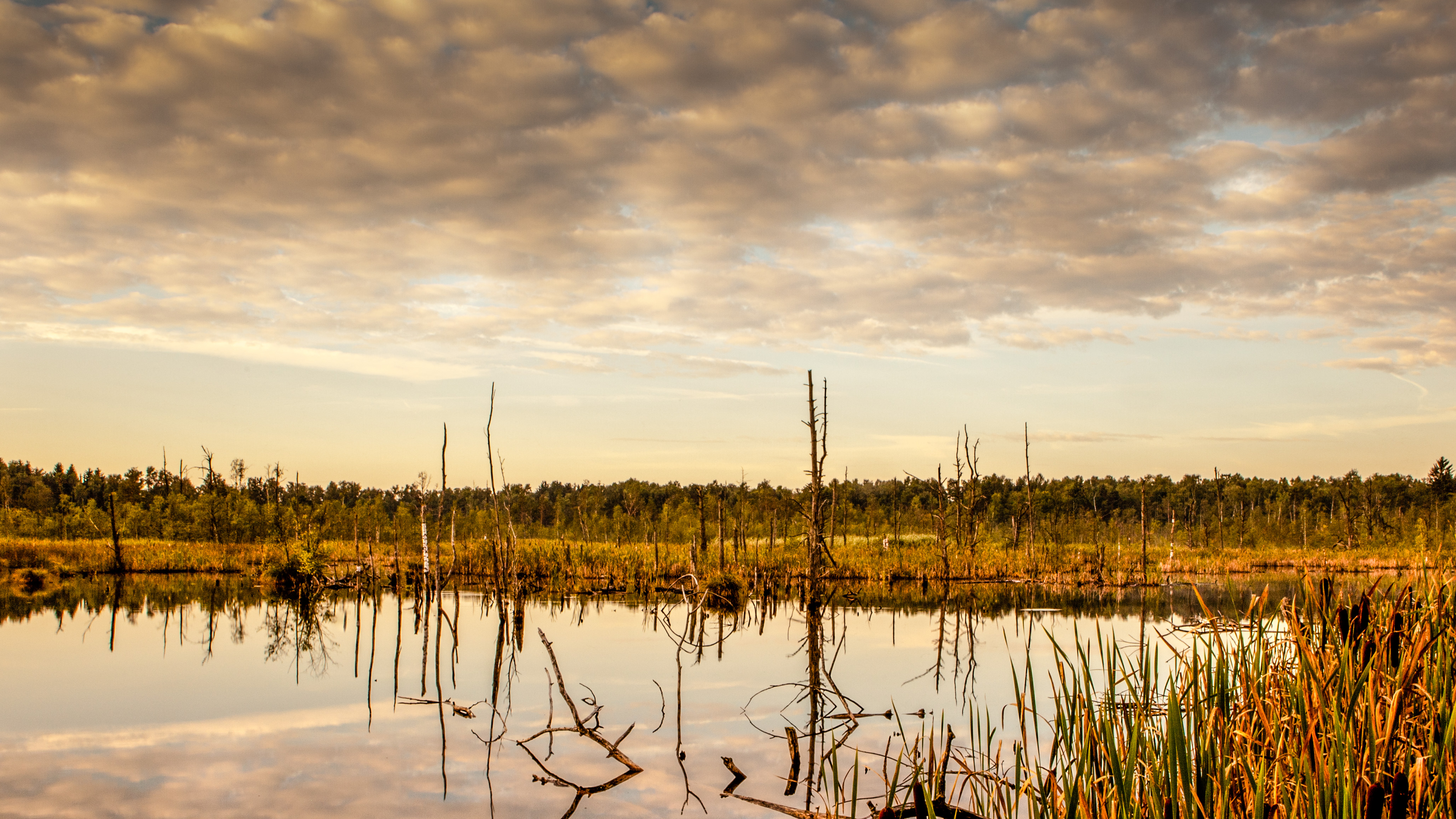 Schwenninger Moos; NSG:BW-3.028